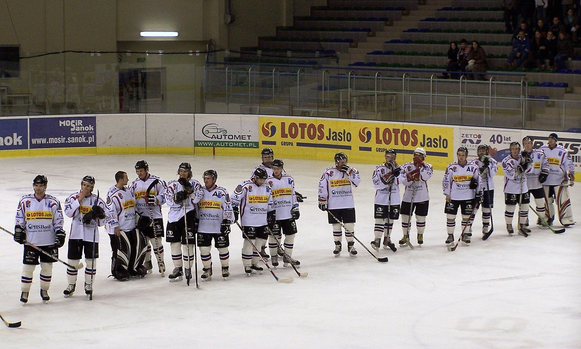 KH Sanok podczas meczu z HK Trebiszów 29.12.2006 w ramach rozgrywek o Puchar Burmistrza Miasta Sanoka